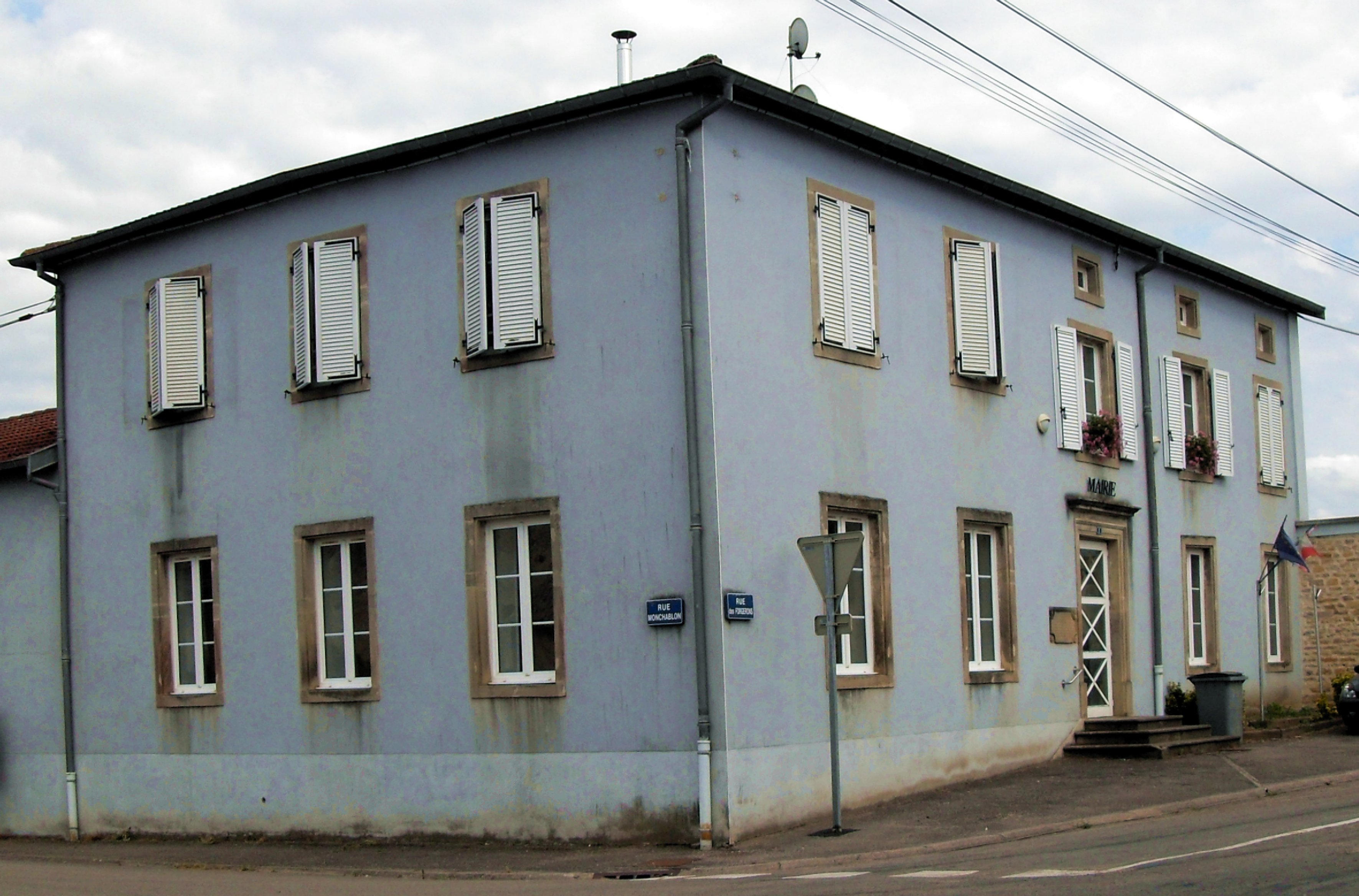 La mairie-école d'Avillers